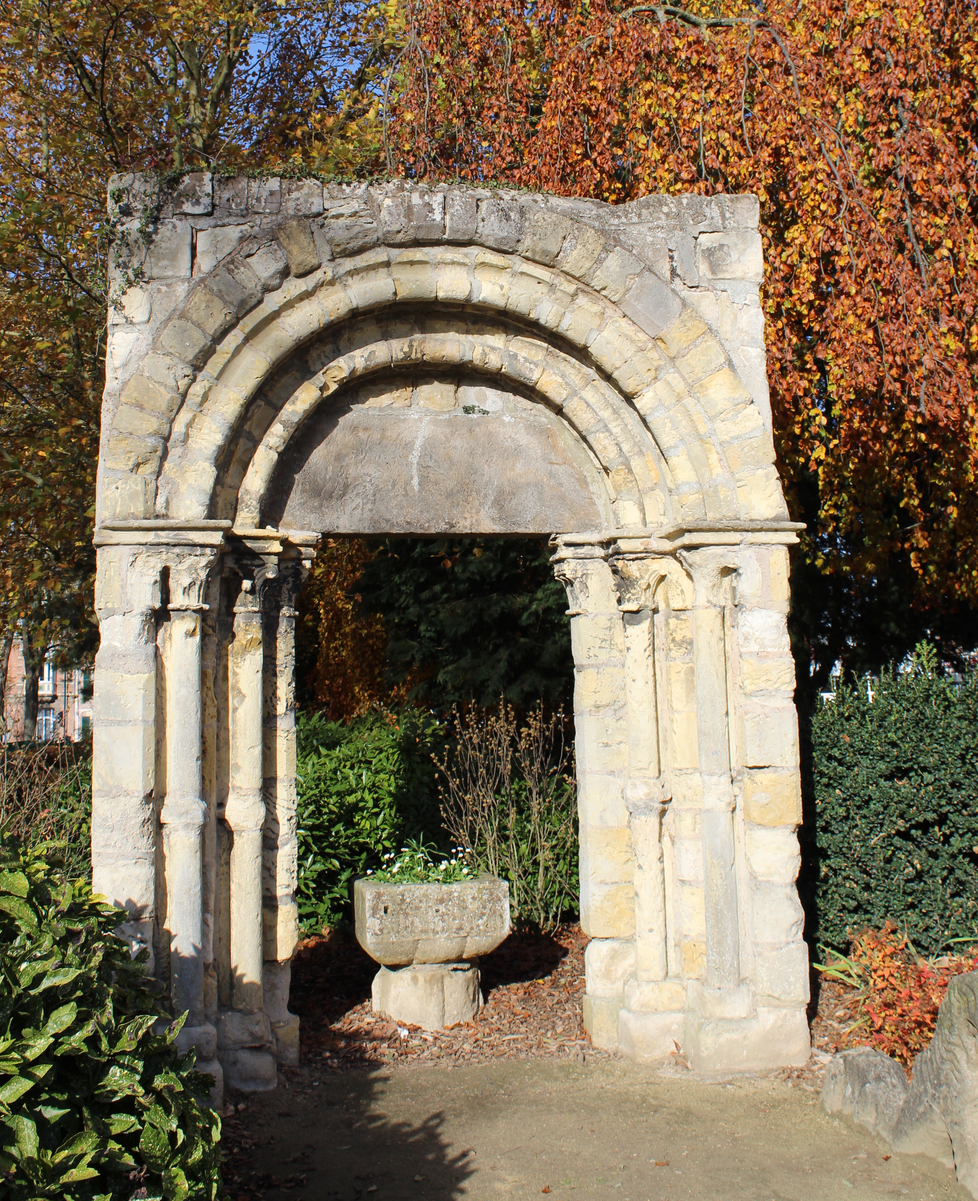 Ancien portail de l'église (XIIè siècle).